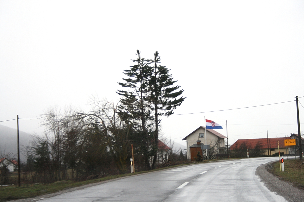 Ričice (Lovinac municipality)